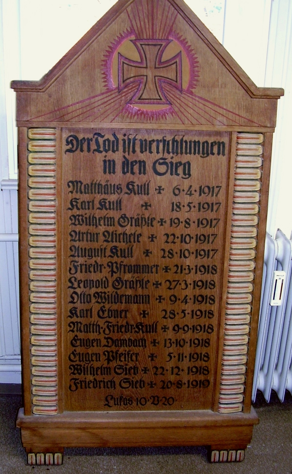 Gedenktafel in Bernbach für im Krieg gefallene Soldaten. Entwurf Rudolf Lempp 1920.